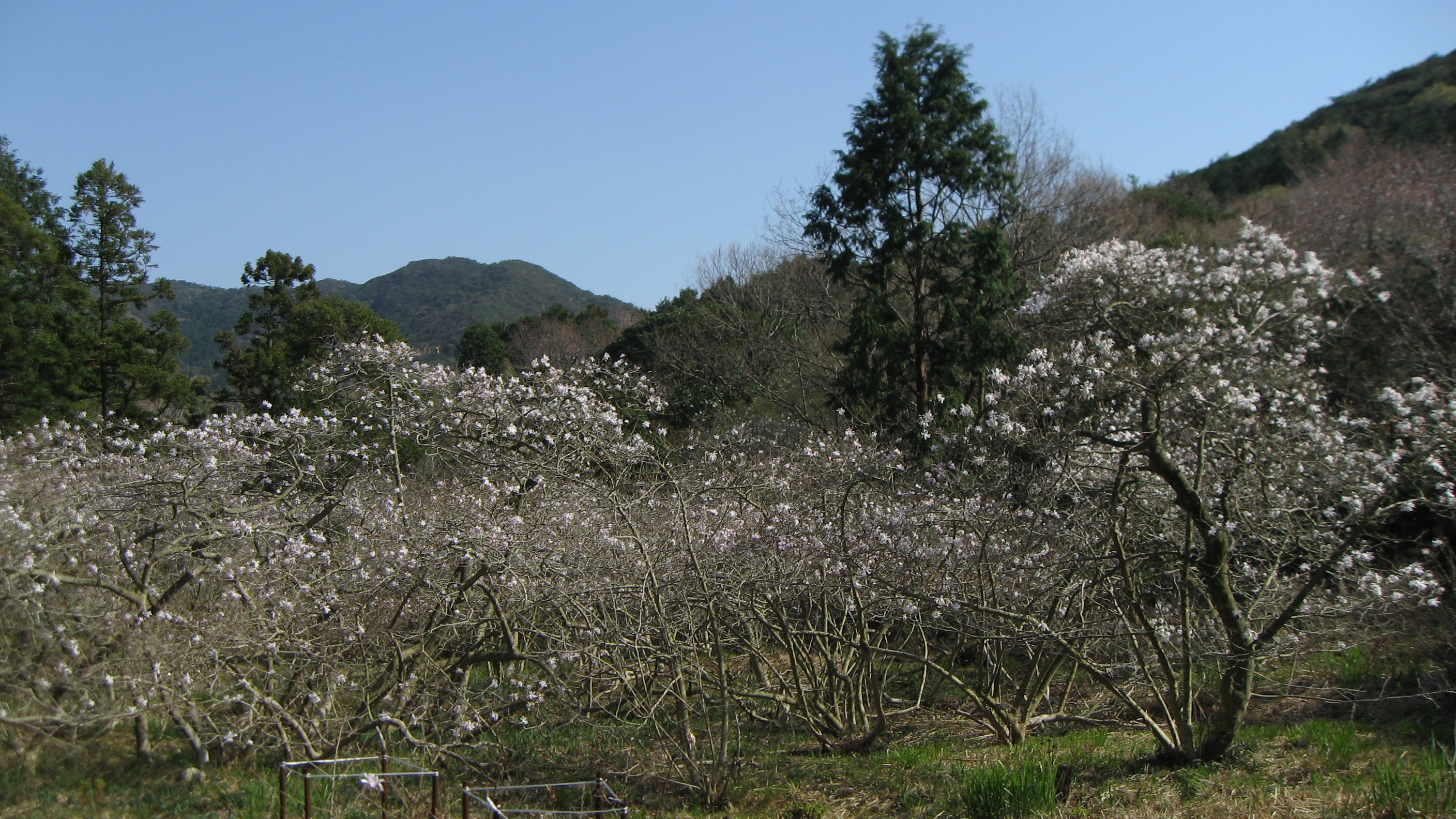 Magnolia stellata at Nagusa (Natural monument of Japan), Ikawazu, Tahara, Aichi, Japan.